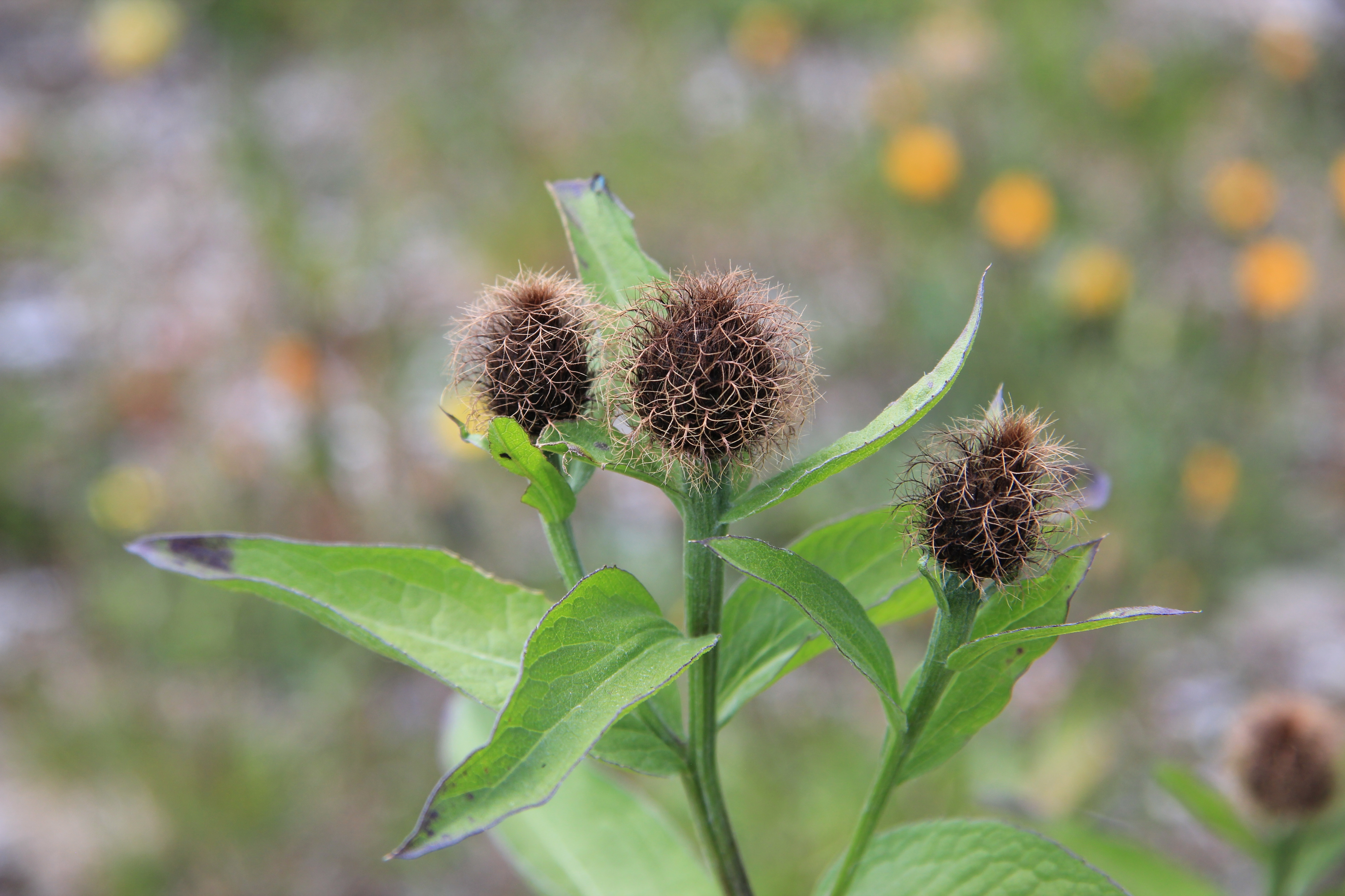 Perücken-Flockenblume (Centaurea phrygia) im Gasteinertal, Fundort Naßfeld Höhe ca. 1600-1800 Meter ü.Adria